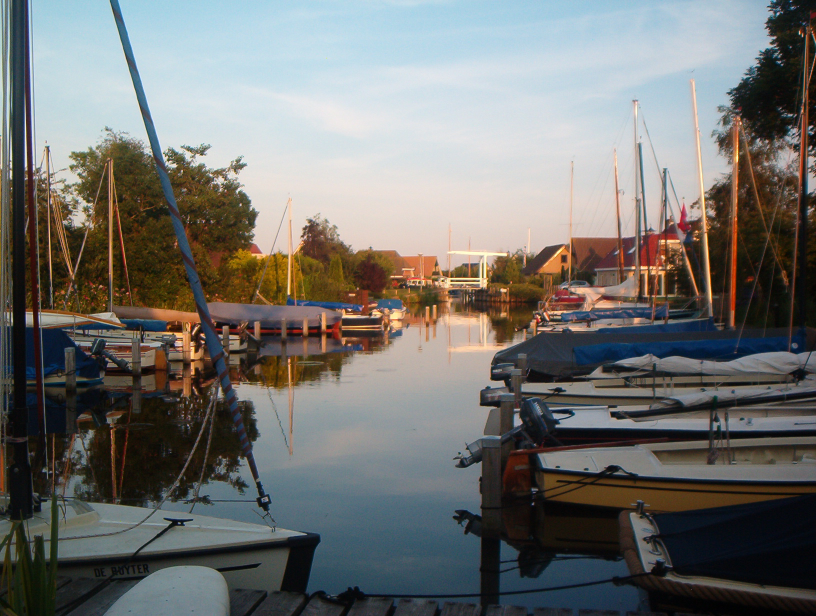 Bungalowpark 't Garijp (het haventje)